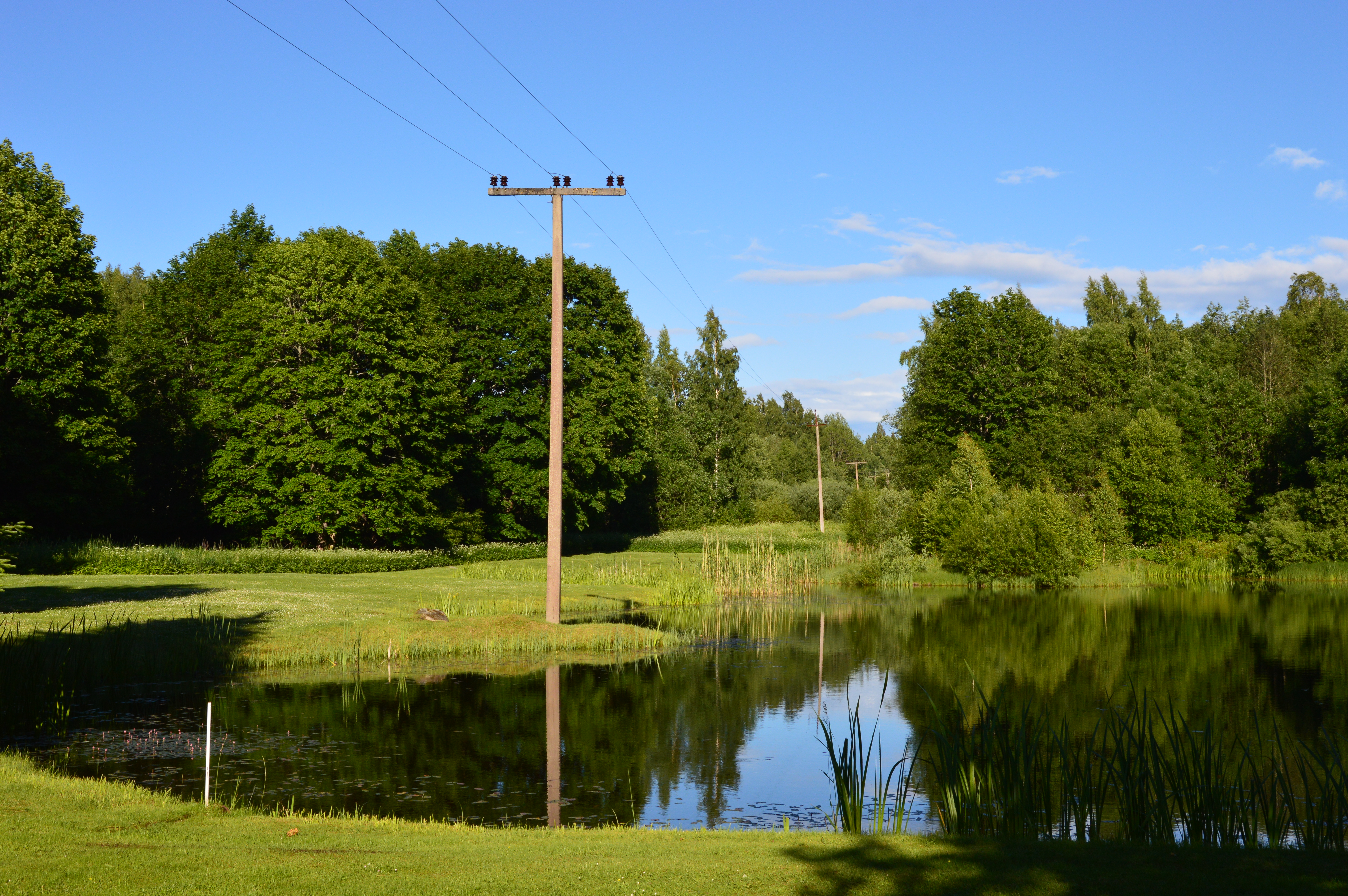 Koke külalistemaja tiik